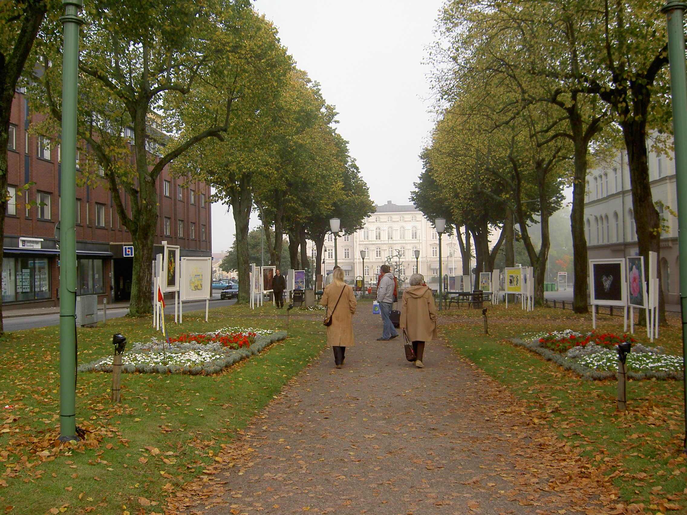 Konstutställning i Mariestad. Nya torget och Stadshotellet i bakgrunden.